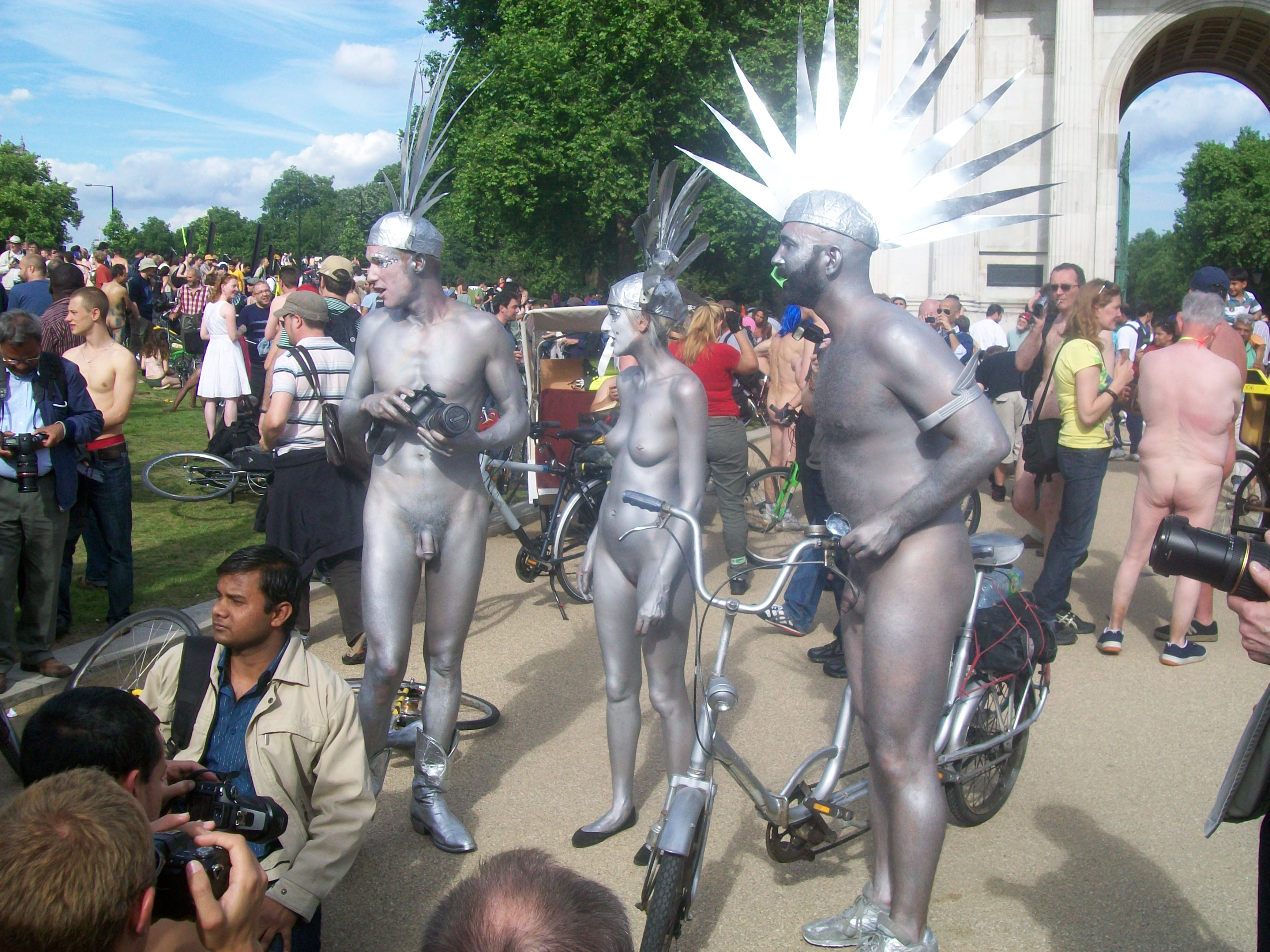 London Naked Bike Ride 2009